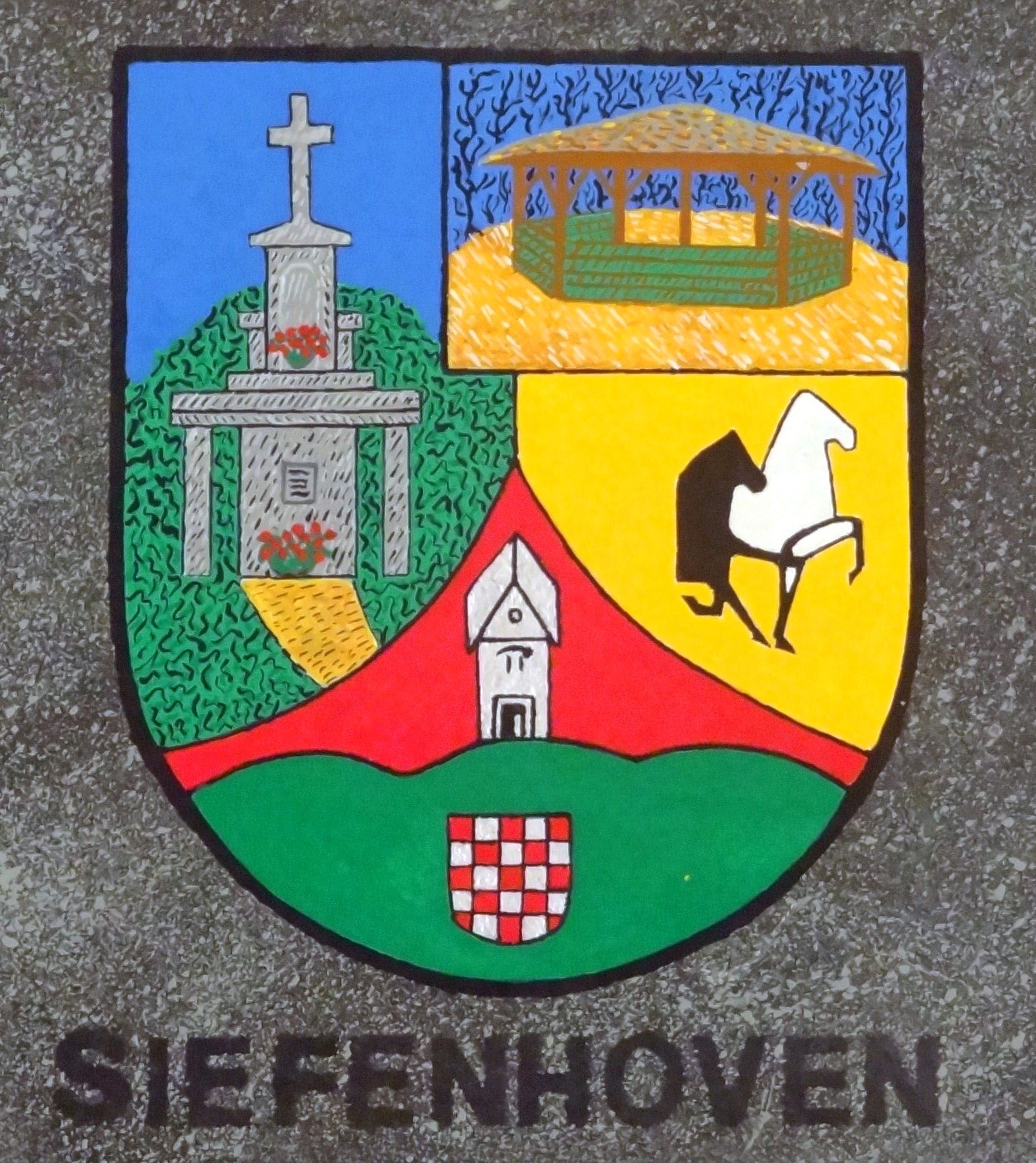 Schiefertafel als Ortswappen von Siefenhoven, erstellt von Richard Lenzgen